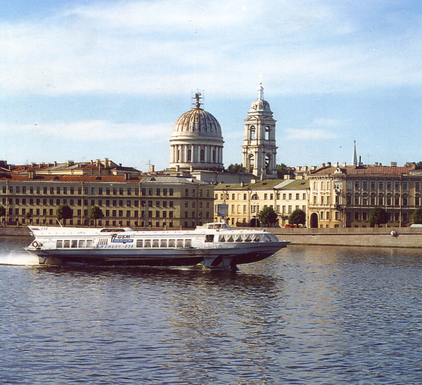 Собственное фото. 1999 год. Изображение православной церкви Св.Екатерины на Васильевском острове Санкт-Петербурга